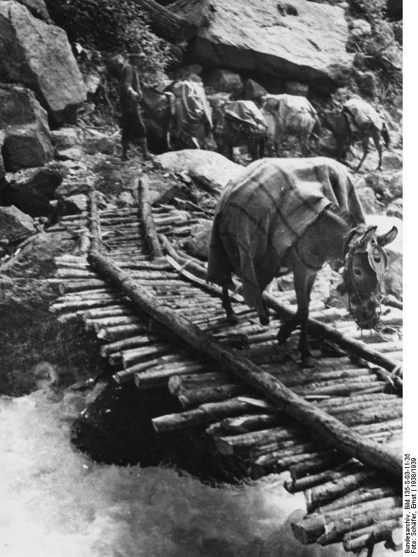 Brücken, Monsun und Wasser zwischen Mangen und Chungtang